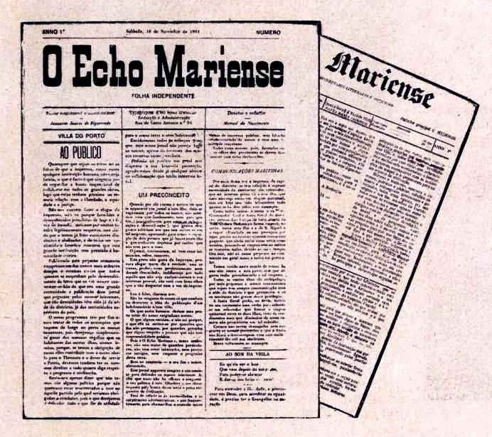 Fac-simile de "O Echo Mariense" e de "O Mariense", primeiros periódicos da ilha de Santa Maria (Açores) in CABRAL, Júlio. "A Imprensa em Santa Maria", apud Álbum Açoriano, fascículo nº 37, 1903. pp. 293-295.